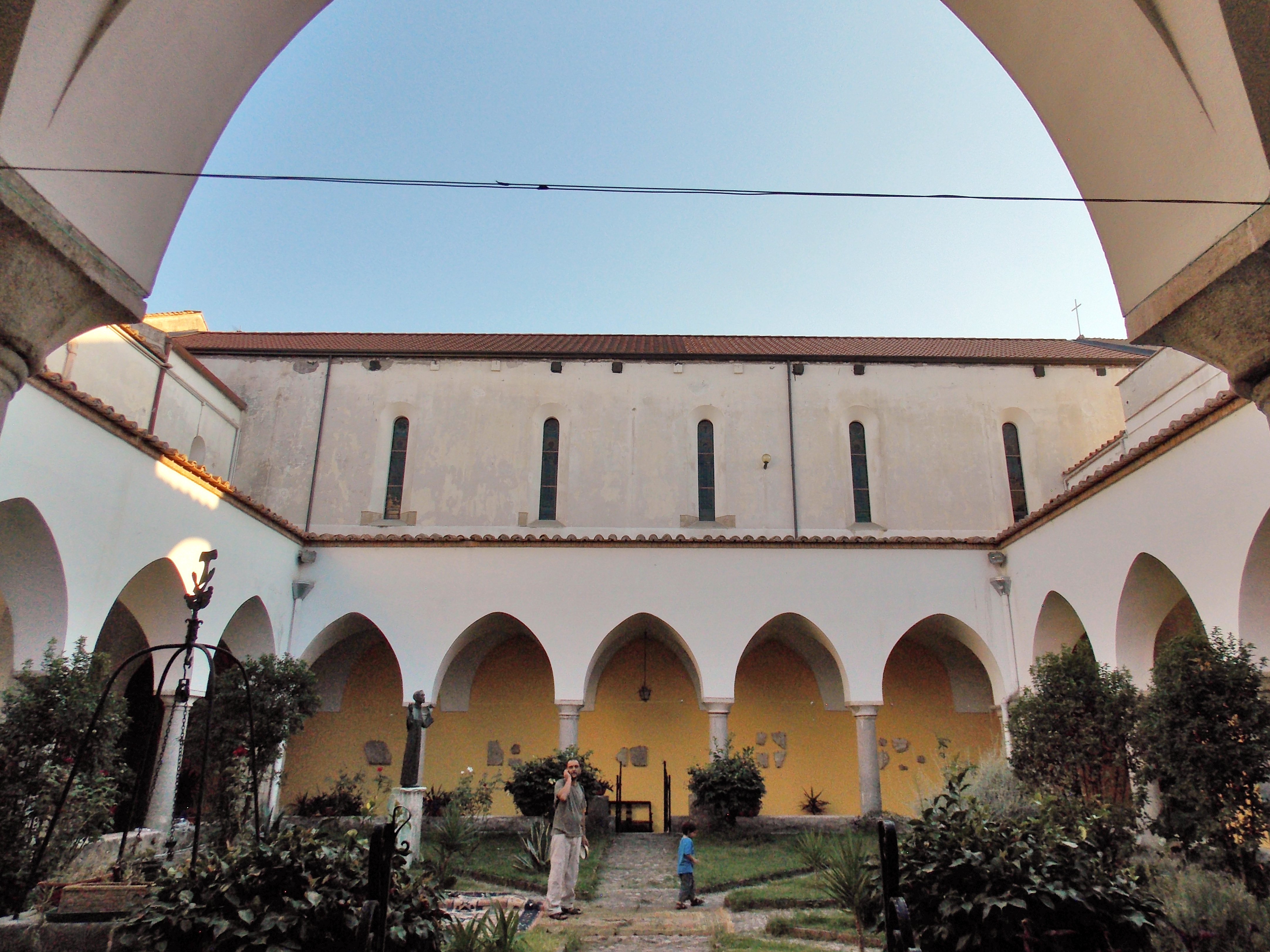 Convento di San Francesco di Benevento. Chiostro grande